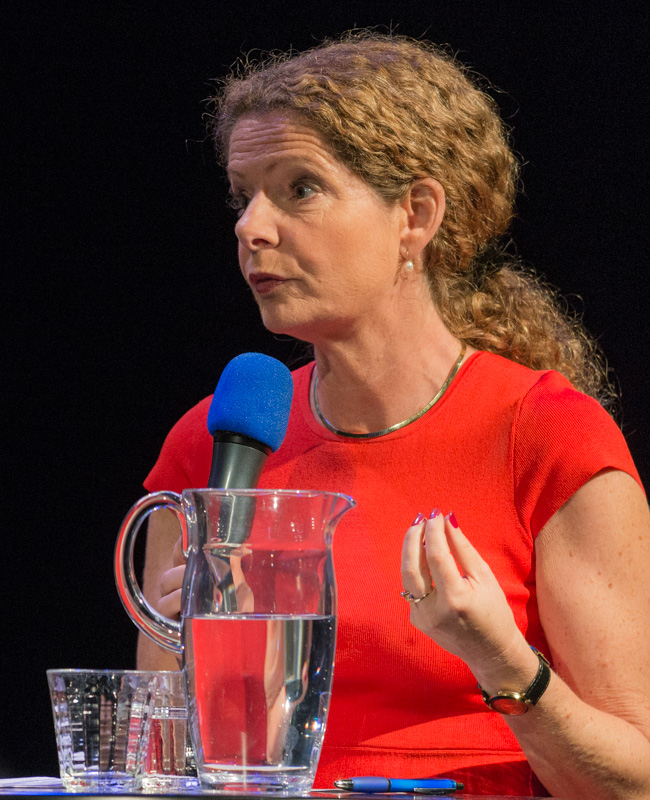 Cilla Benkö under seminariet "Europa och det fria ordet" om yttrandefrihet och journalisters säkerhet med anledning av att den svenska tryckfrihetsförordningen firar 250 år. Samtalets ägde rum på Kulturhuset Stadsteatern i Stockholm den 3 oktober 2016 under ledning av Sveriges Radios utrikeschef Ginna Lindberg och direktsändes i P1.